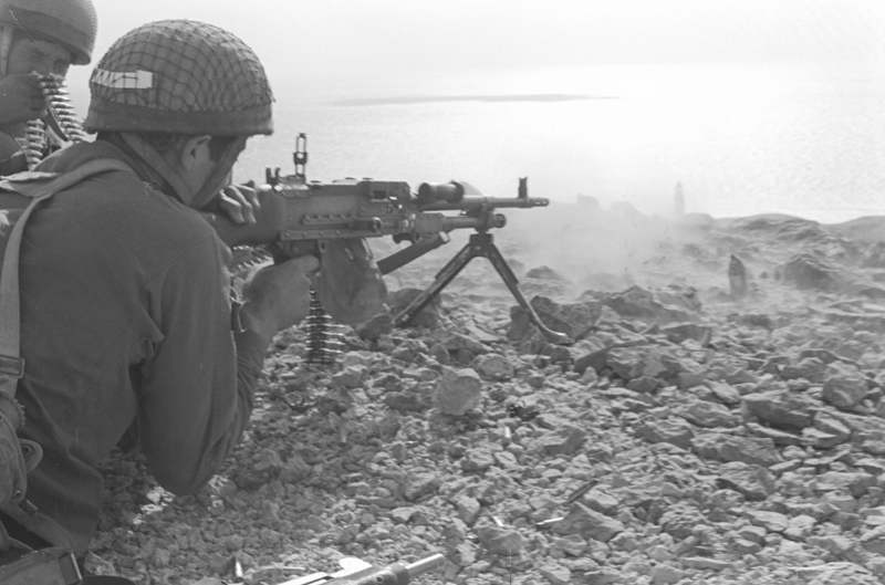 פשיטה לשדואן - מבצע רודוס. לוחמי הצנחנים מתקרבים למגדלור בפשיטה על האי שדואן.